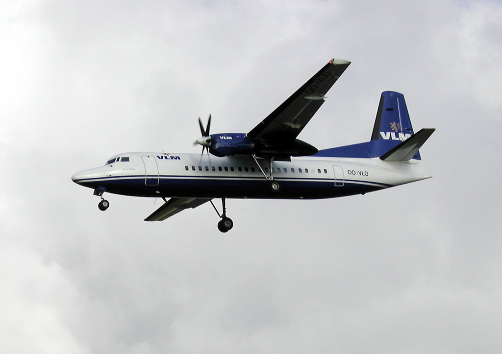 Fokker F50 (OO-VLO) van VLM Airlines nadert de luchthaven van Brussel Nationaal in 2001. (Eigen foto)